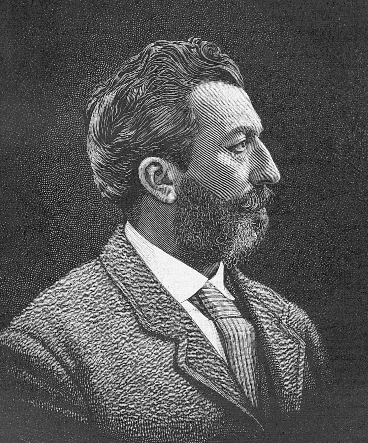 Гоппе Герман Дмитриевич, издатель, 1880-е годы